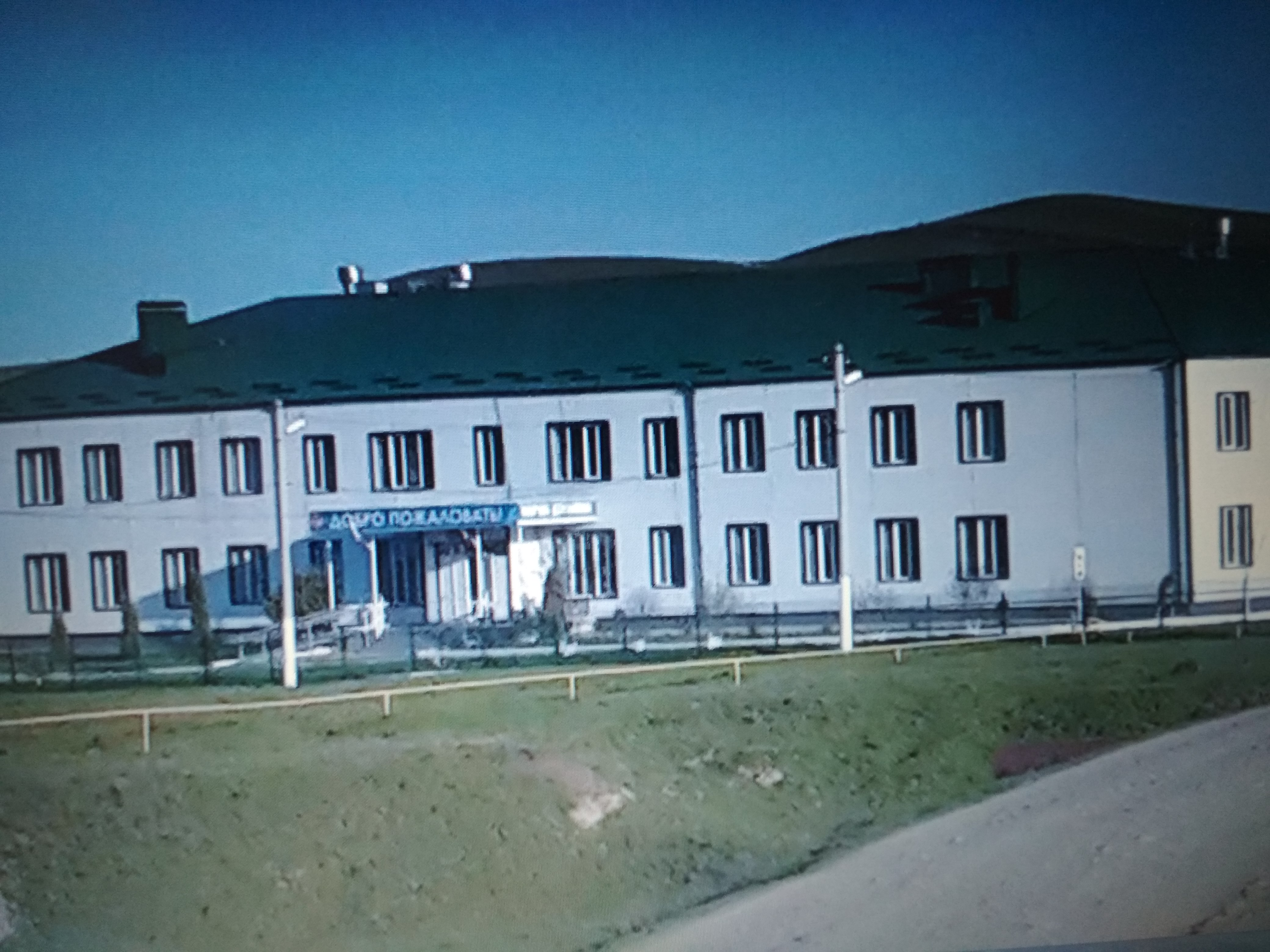 Нохчийн: Аьчка-Хит1ан юккъера ишкол